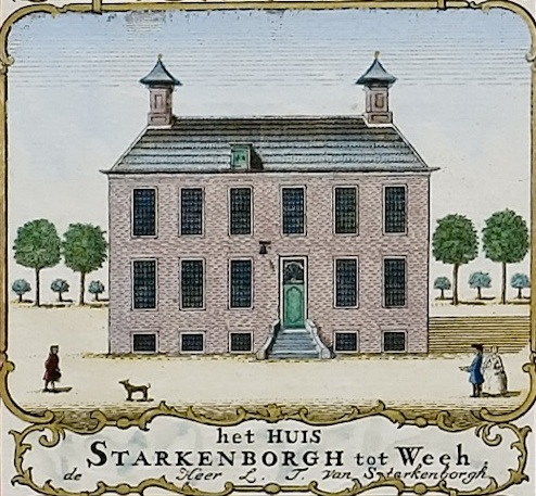 Huis Starkenborgh in Wehe-den Hoorn. Uitsnede uit de kaart van Theodorus Beckeringh uit 1781